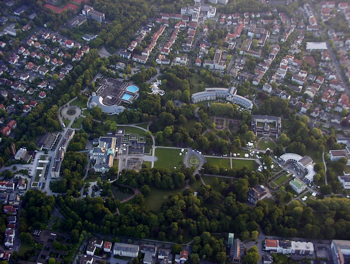 Kurpark Bad Oeynhausen Sonstiges: ...